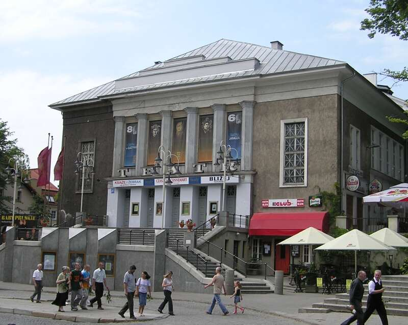 Teatr im. Stefana Jaracza w Olsztynie